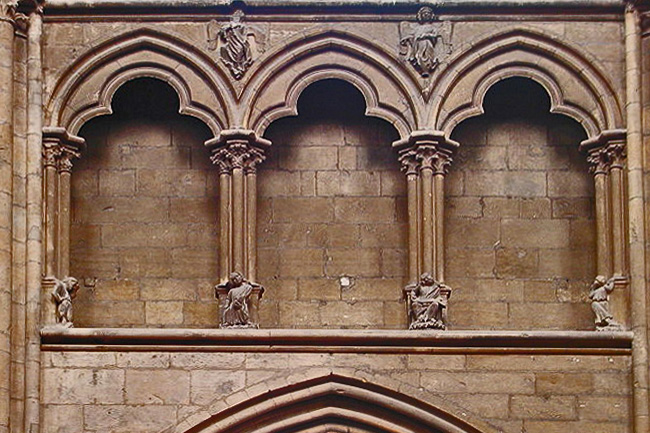 Nevers_Cathedrale_Triforium